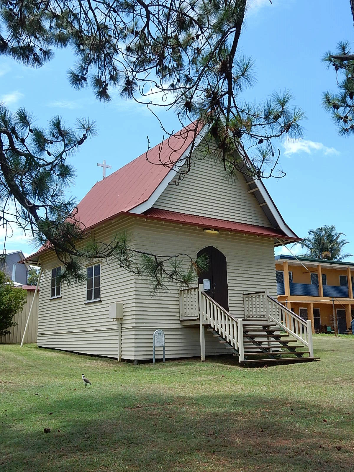 Village Church - St Mark's